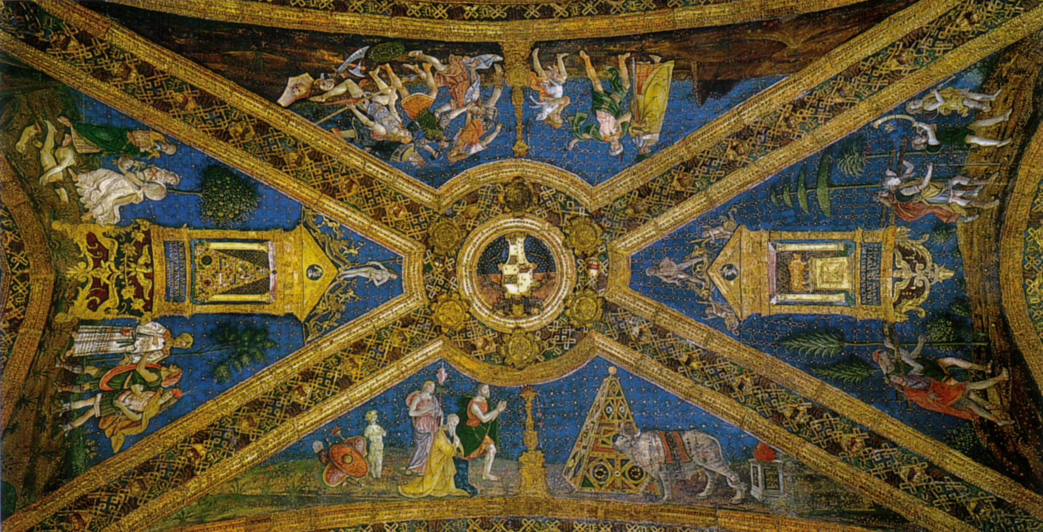 Appartamento borgia, sala dei santi, episodi del mito di iside e osiride